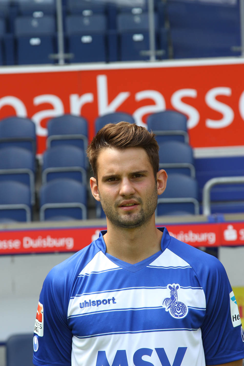 Tim Albutat 2015